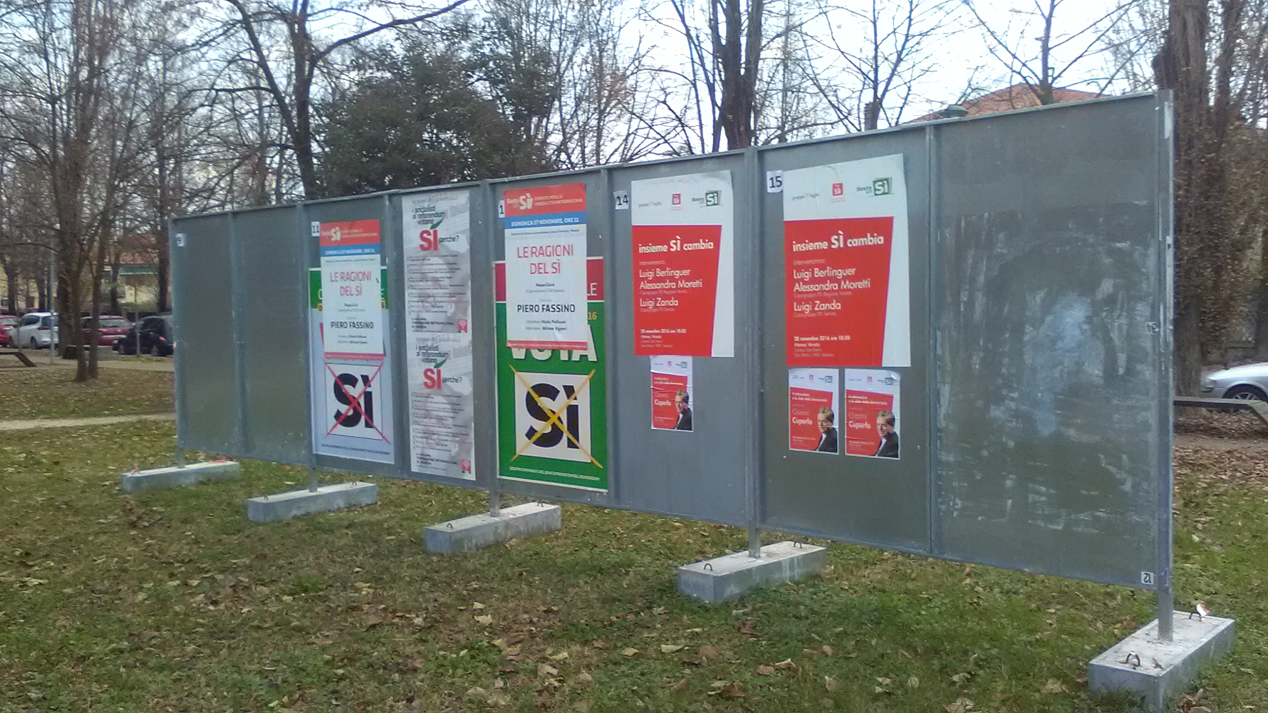 Propaganda in occasione del referendum costituzionale 2016